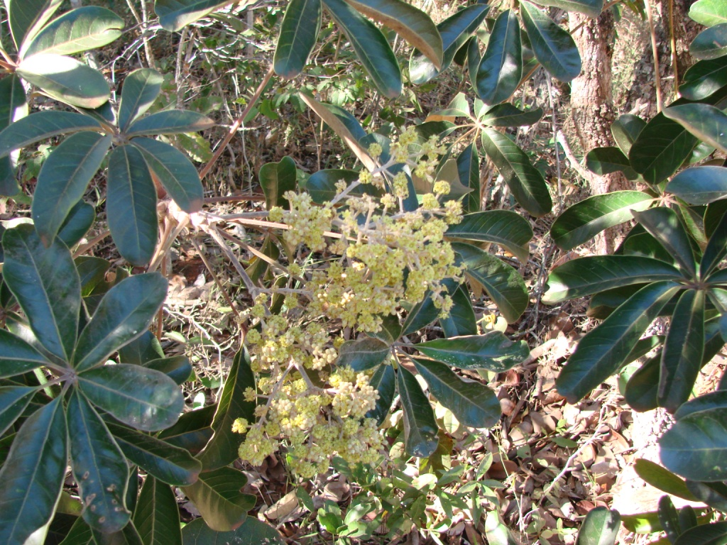 Schefflera macrocarpa - ARALIACEAE - Jardim Botânico de Brasília - DF - Brasil